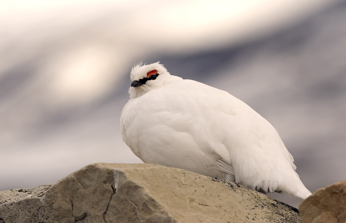 Svalbardrype (stegg) Lagopus muta hyperborea Svalbard rock ptarmigan